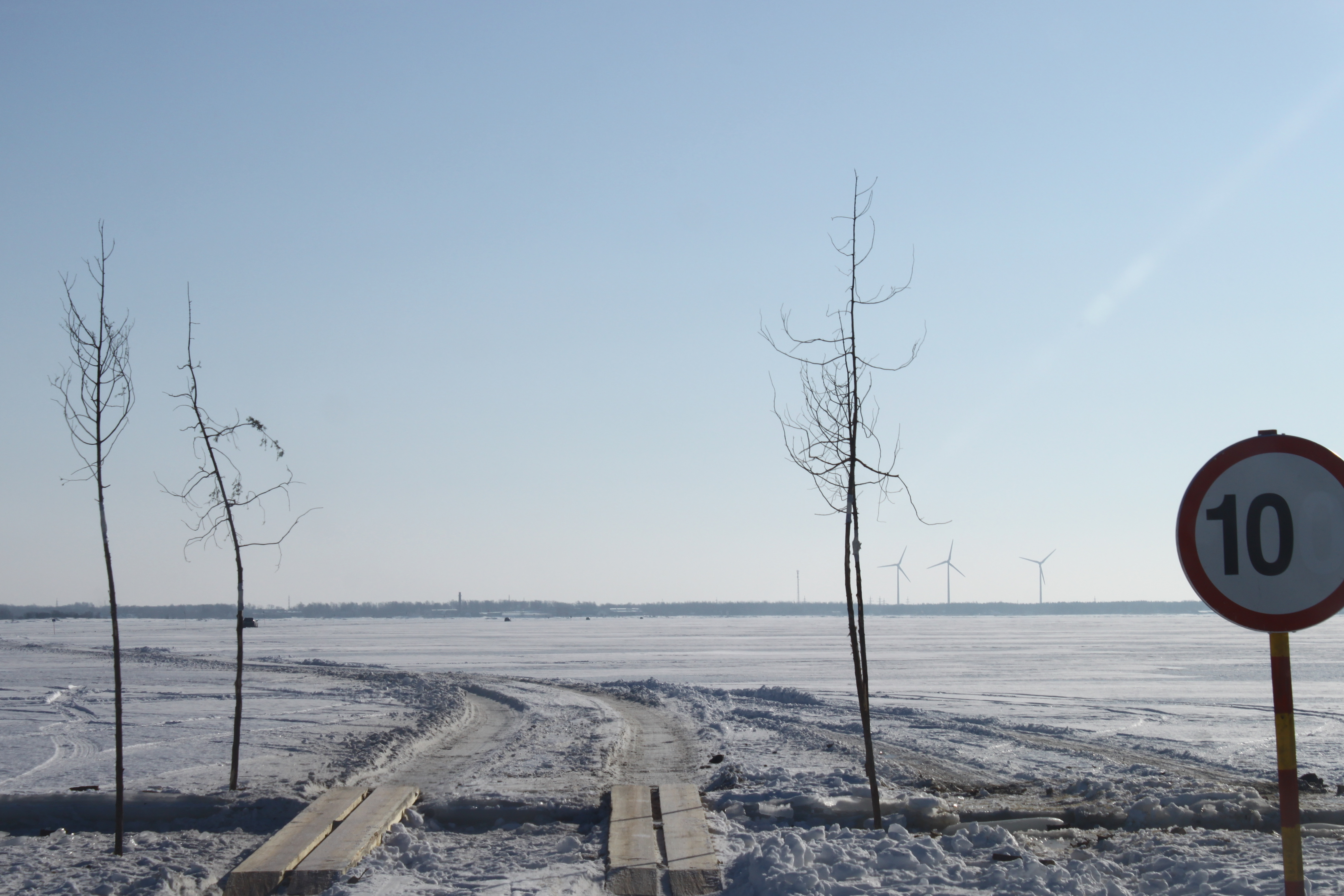 Kuivastu-Virtsu jäätee